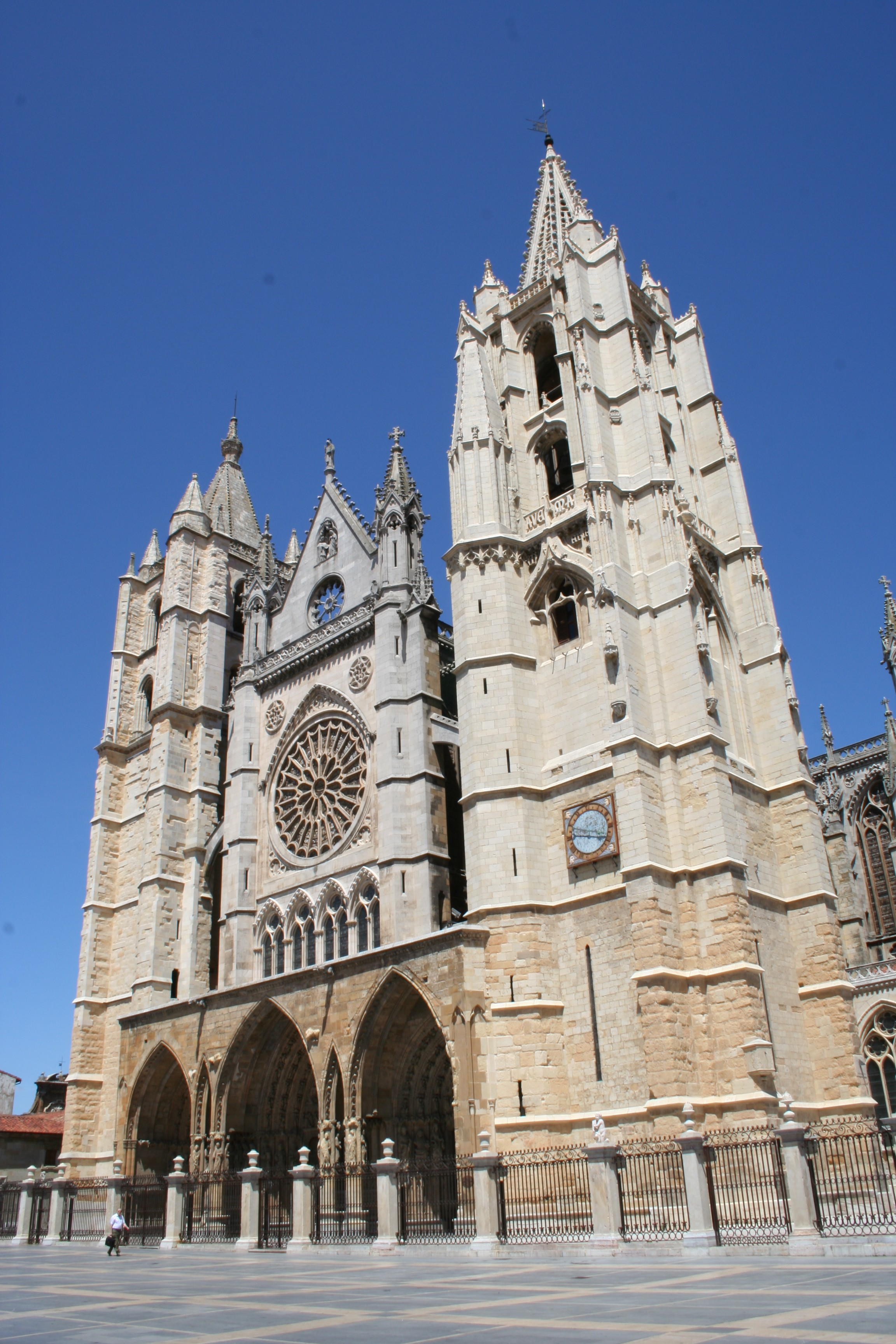 Fachada principal de la catedral